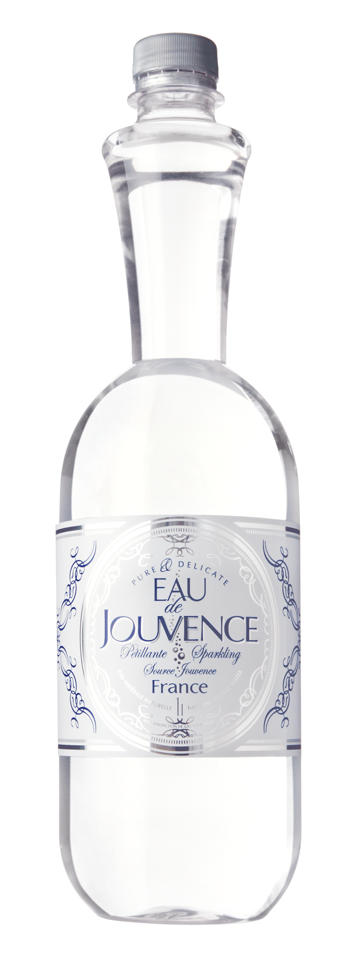 Bouteille de d'eau de jouvence 1 litre.